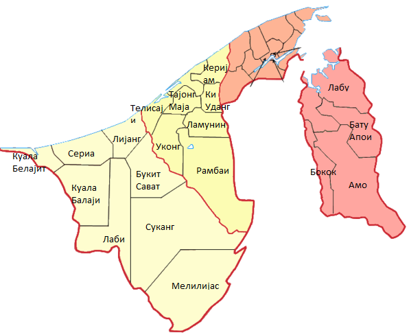 x